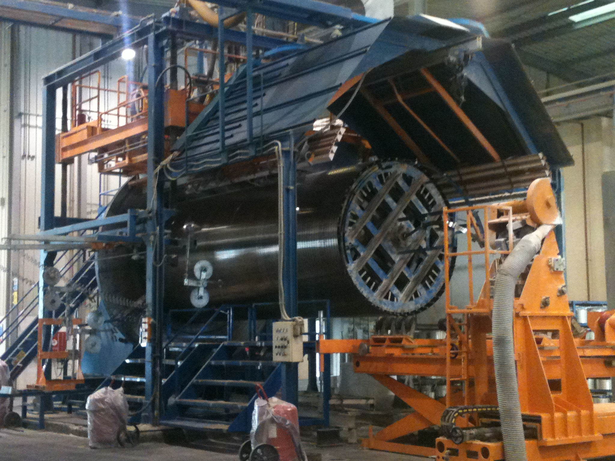 தொடர் இழைச் சுற்று இயந்திரம் ( CFW Machine ). இந்தப் புகைப்படம் சவுதி அரேபியாவில் உள்ள தம்டித் பைப்ஸ் ( Tamdid Pipes) என்ற தொழிற்சாலையில் இருந்து எடுக்கப்பட்டது.